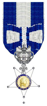 Ordre de la fidélité, France, 1816